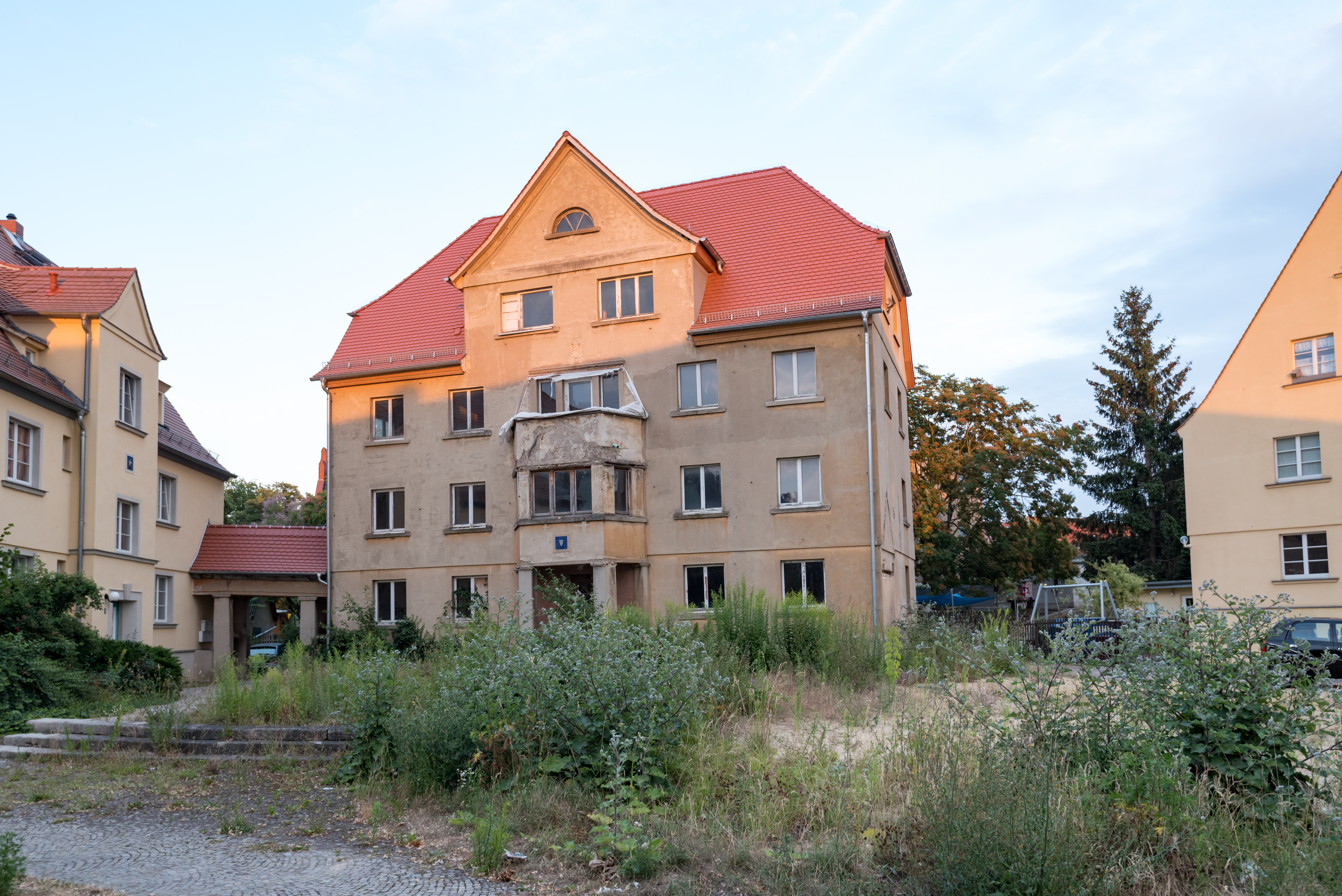 Naumburg (Saale), Maoritzplatz 8